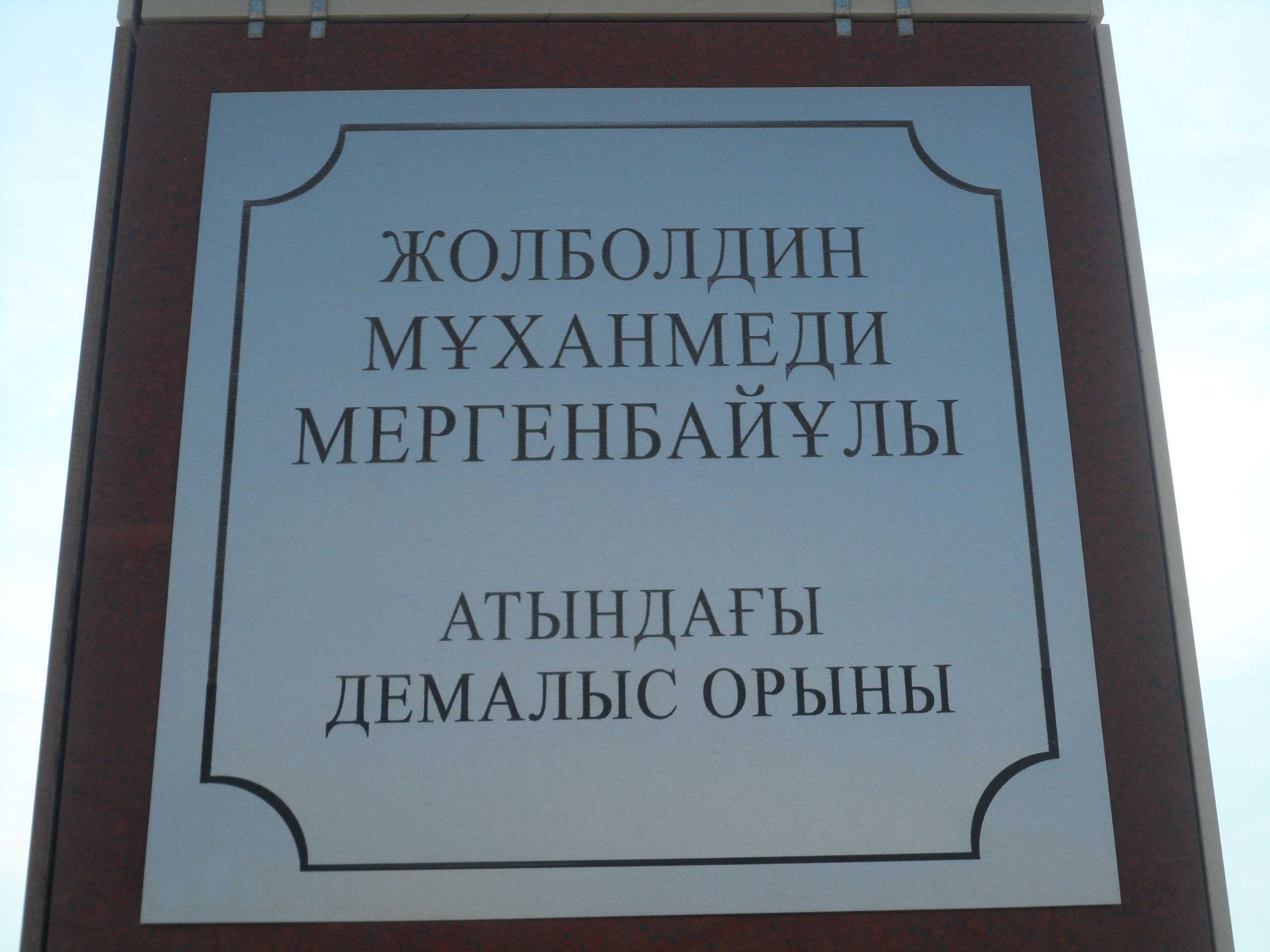 Құрық мекені. Демалыс паркі.